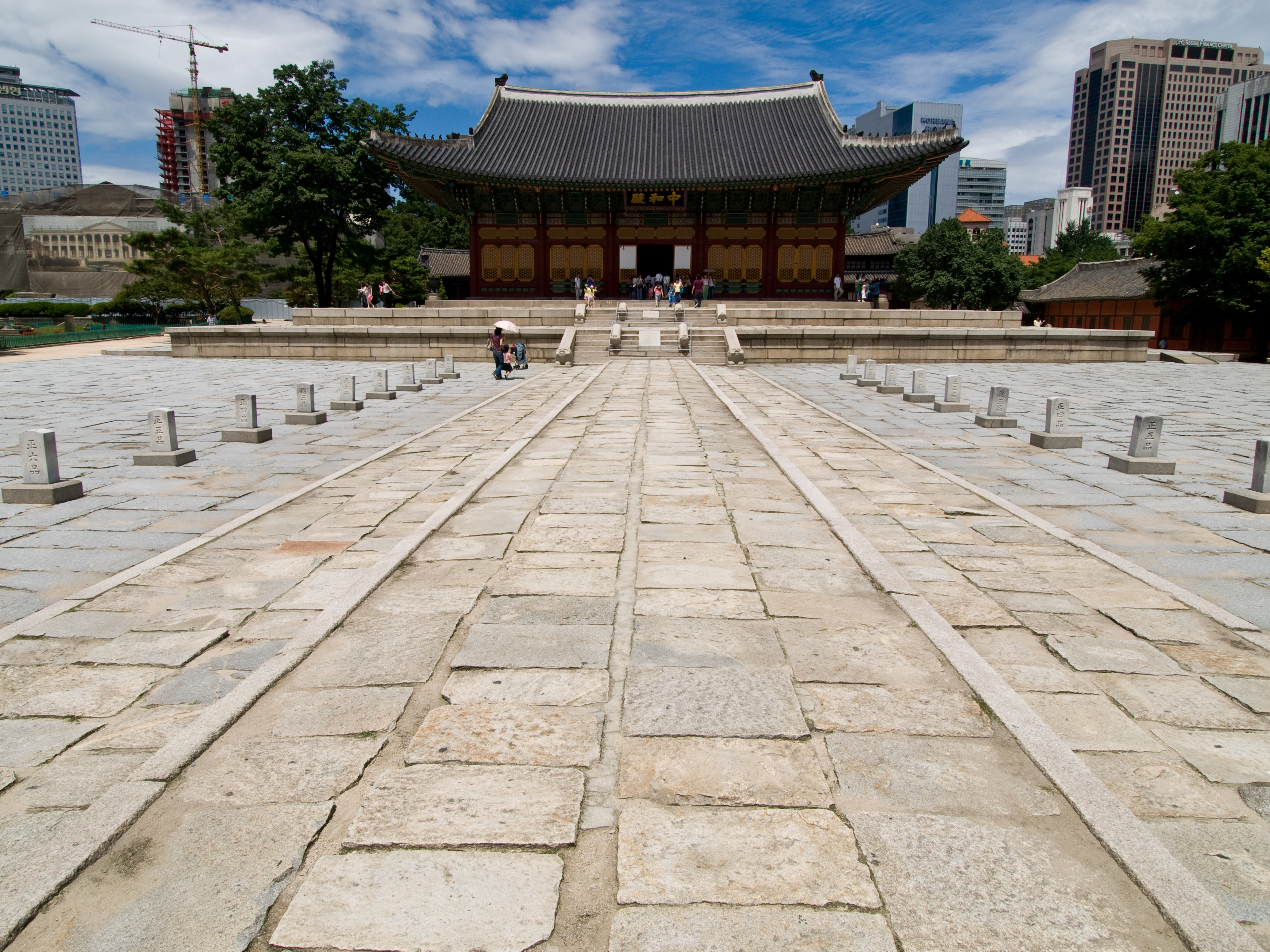 서울시 덕수궁, Deoksugung (Palace) in Seoul, Korea